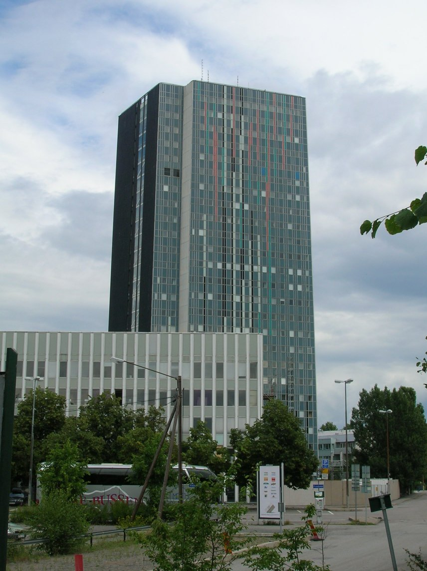 Wenner-Gren Center, Stockholm, Sweden.